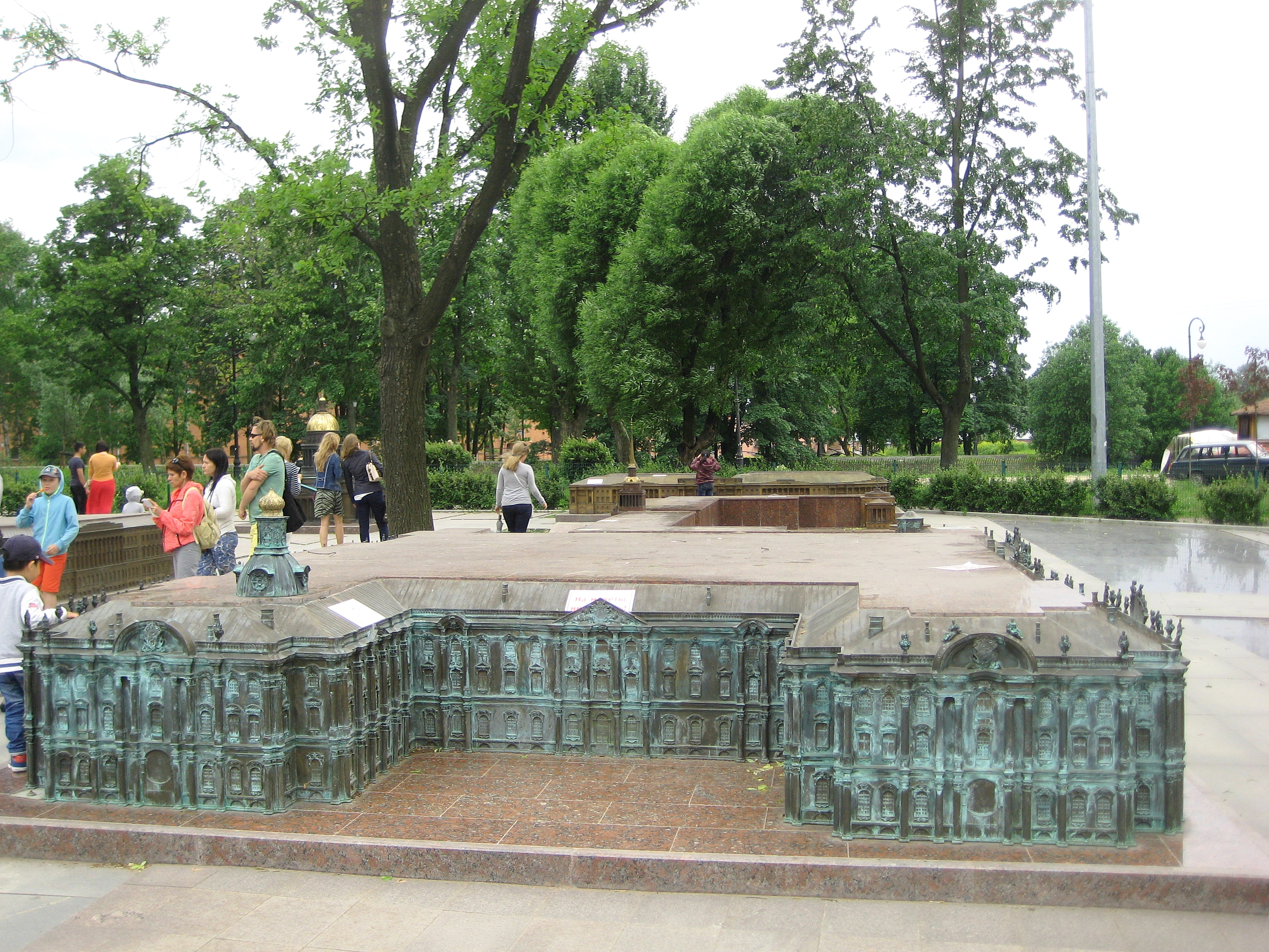 Санкт-Петербург. Александровский парк. Макет Зимнего дворца